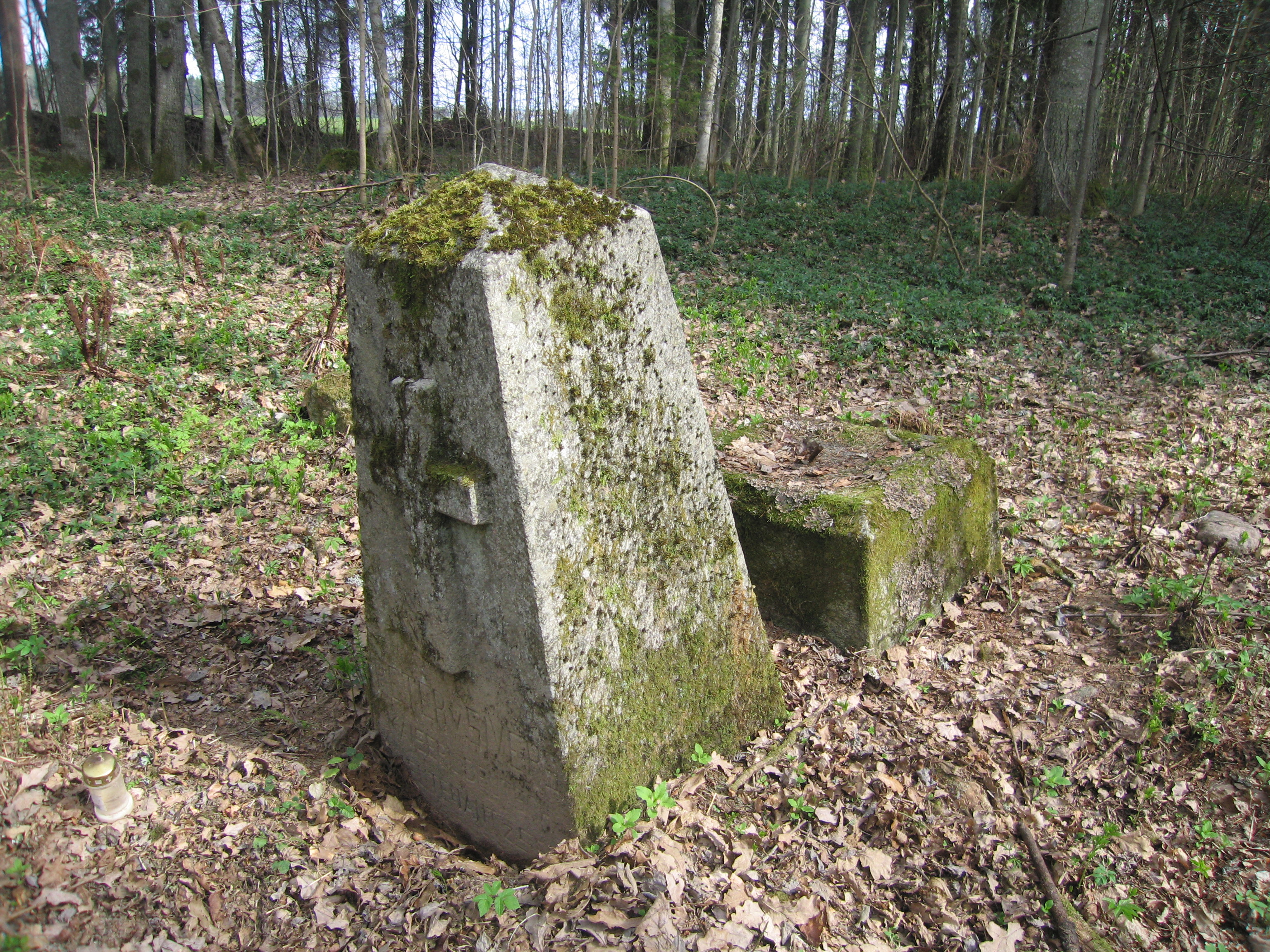 Hauatähis kalmistul. Foto: Robert Treufeldt, 30. aprill 2011